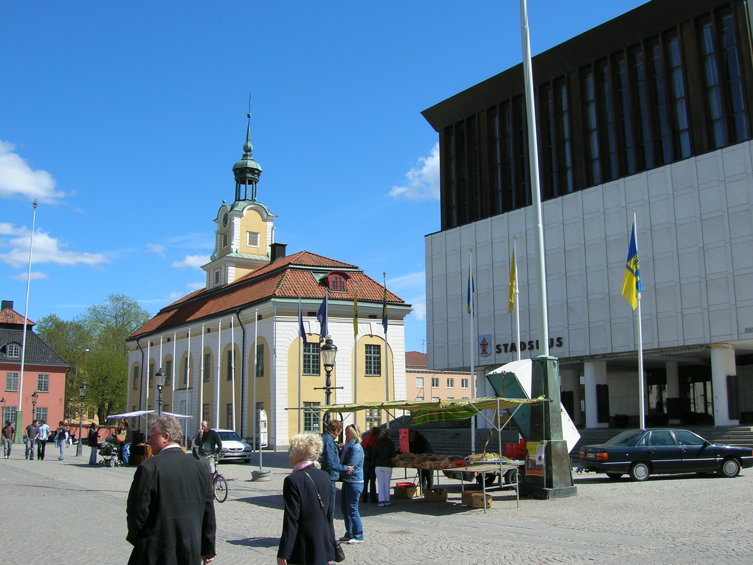 Stadshuset och rådhuset vid Stora torget i Nyköping